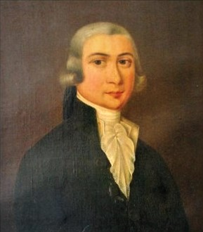 French journalist, politician, president of the Jacobin Club and revolutionary.